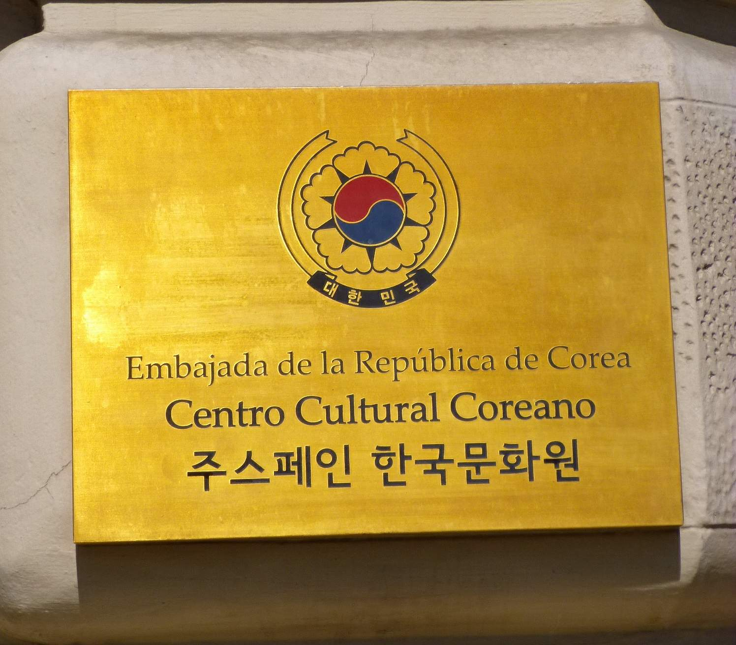 Embajada de Corea del Sur en Madrid